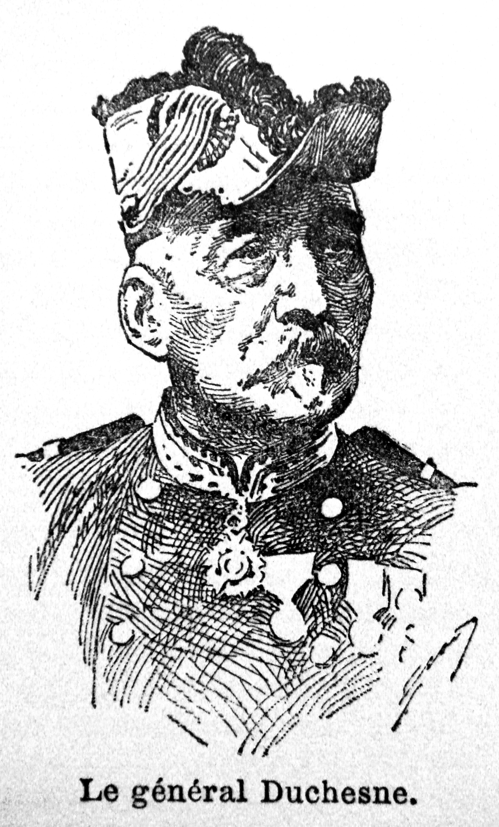 General_Jacques_Duchesne